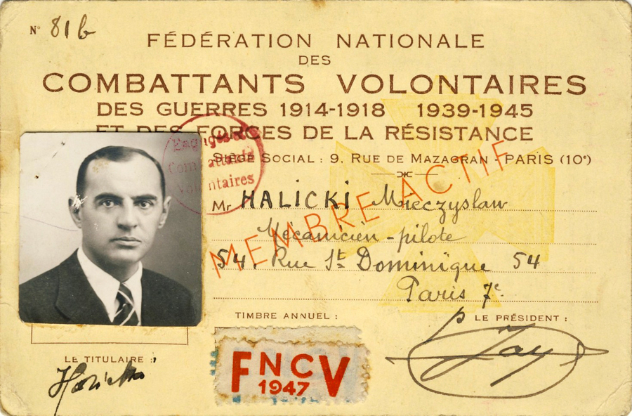 Legitymacja nadania Mieczysławowi Halickiemu odznaczenia Croix du Combattant Volontaire